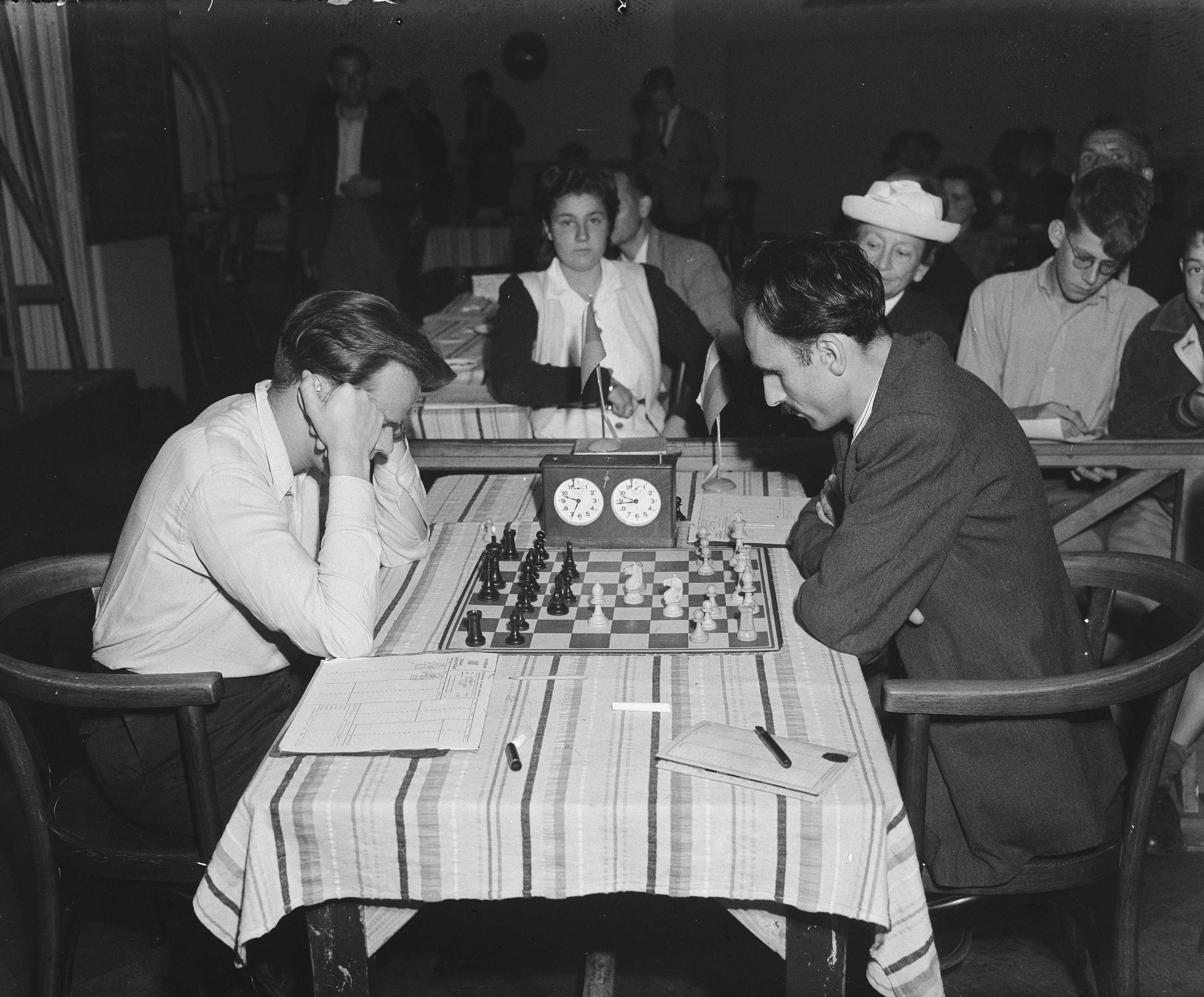 Collectie / Archief : Fotocollectie Anefo Reportage / Serie : [ onbekend ] Beschrijving : Zone schaaktoernooi Hilversum. Pachman (Tjeschoslowije, links) vs. Tsvetkov (Bulgarije) Datum : 1 augustus 1947 Locatie : Hilversum Trefwoorden : schaken, toernooien Persoonsnaam : Pachman, Ludek, Tsvetkov, Alexander Fotograaf : Wisman, Bram / Anefo Auteursrechthebbende : Nationaal Archief Materiaalsoort : Glasnegatief Nummer archiefinventaris : bekijk toegang 2.24.01.09 Bestanddeelnummer : 902-2911